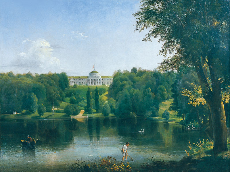 The estate of G. S. Tarnovsky in Kachanovka.label QS:Lru,"Усадьба Г. С. Тарновского в Качановке." label QS:Len,"The estate of G. S. Tarnovsky in Kachanovka."